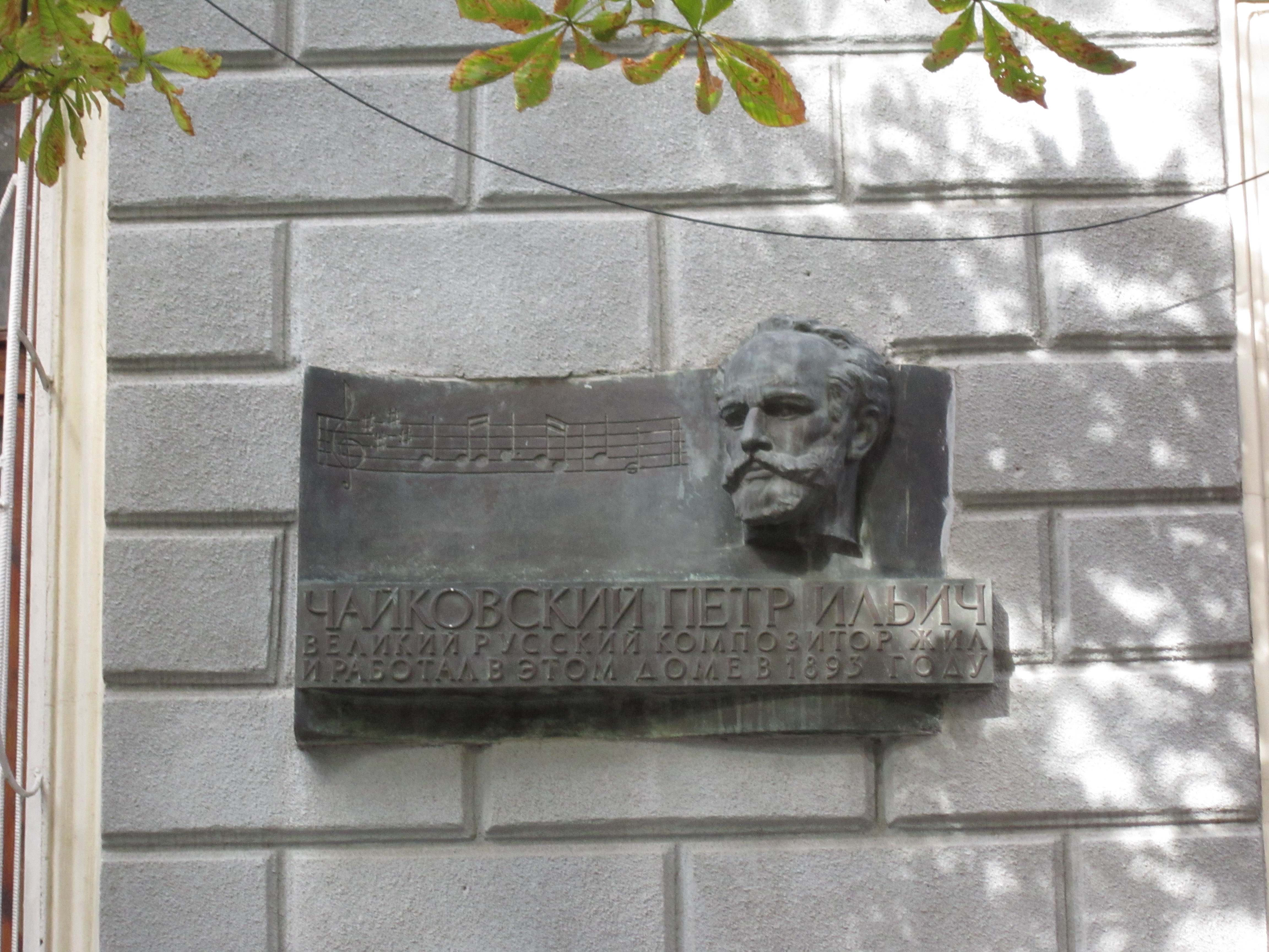 Будинок готелю «Північний», в якому жили: - у 1893 р. Чайковський П. І. - композитор; - у 1899 р. Чехов А. П. - письменник; - у 1871 р. Ушинський К. Д. - педагог; - у 1896–1897 рр. Крушельницька С. А. - оперна співачка; - у 1892 р. Лисенко М. В. - композитор; - у 1894 р. Римський-Корсаков М. А. - композитор; - у 1894 р. Направник Е. Ф. - композитор, Одеса, Чайковського пров., 12